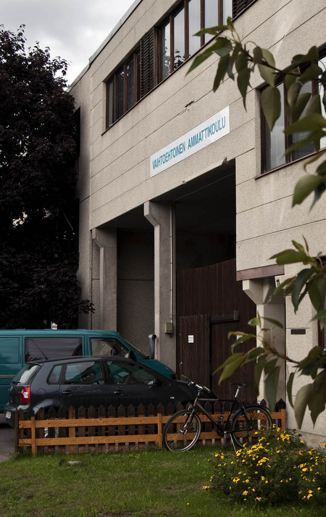 Vaihtoehtoisen ammatti- ja oppisopimuskoulun edustalta, Roihupellon teollisuusalue, Helsinki.